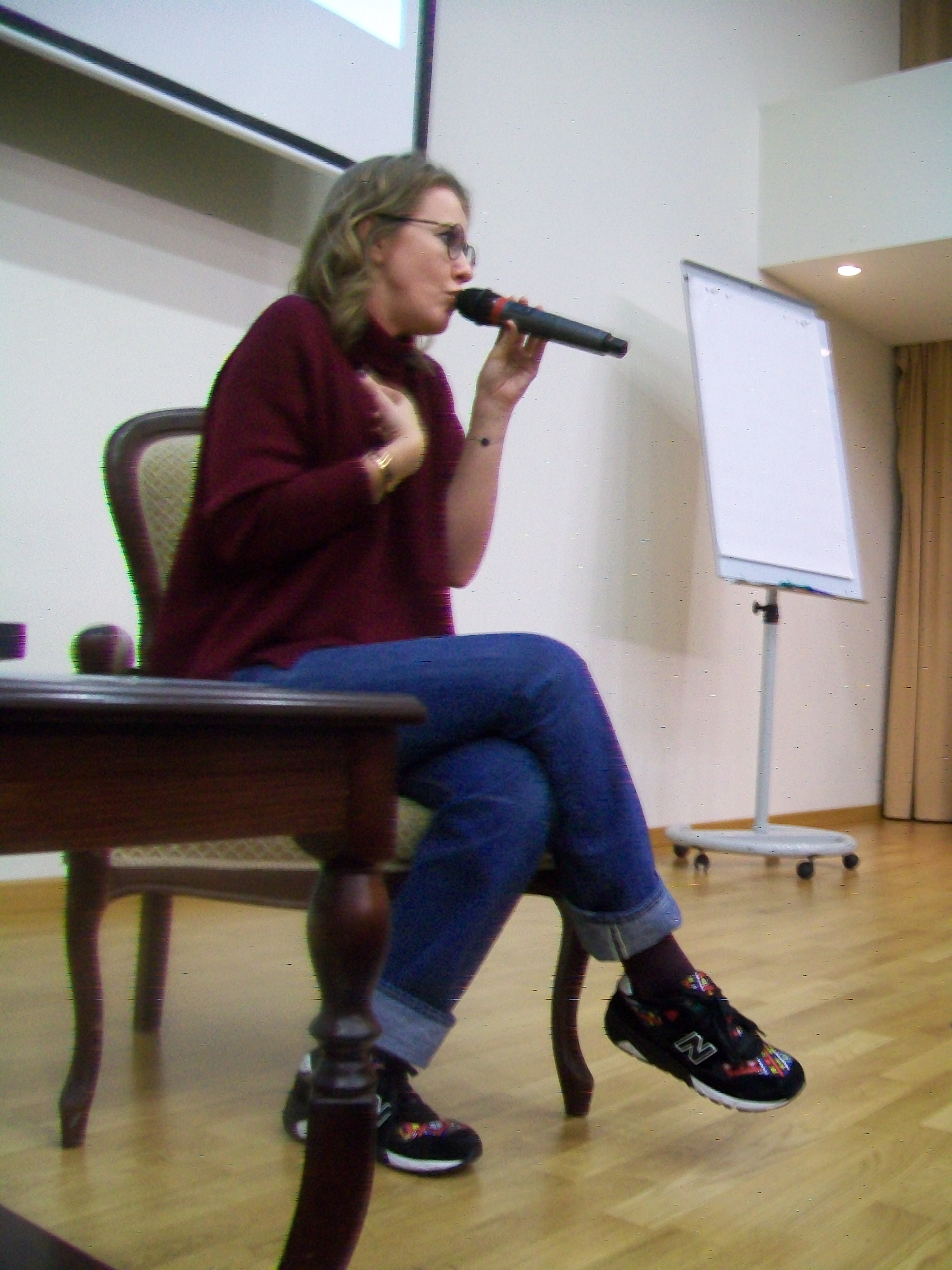 Ксения Собчак на встрече с чиновниками и журналистами в Екатеринбурге. 16 декабря 2017 года